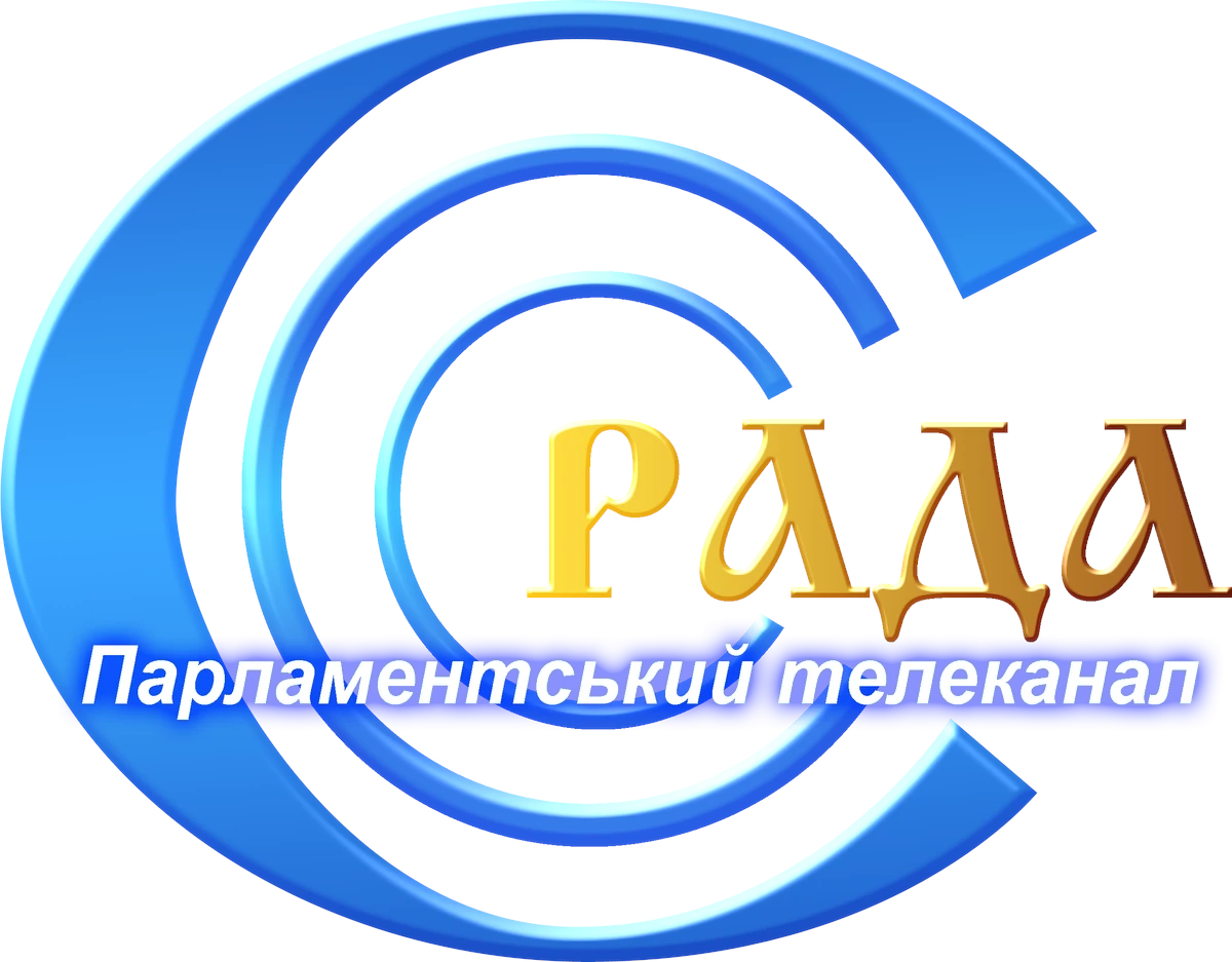 Лого телеканалу 1999-2008